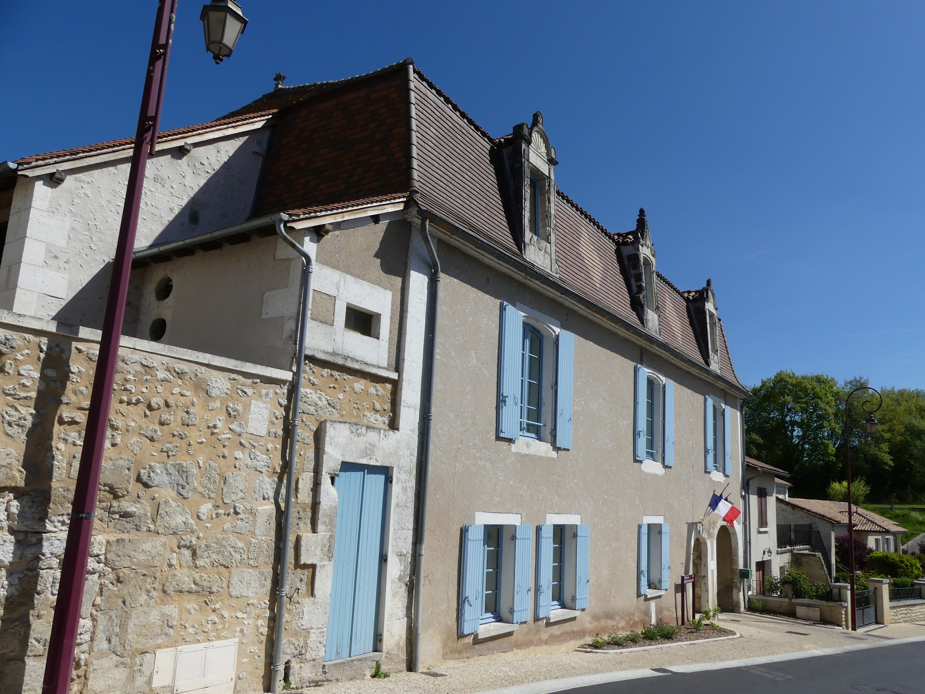 La façade sud de la mairie, Villetoureix, Dordogne, France.